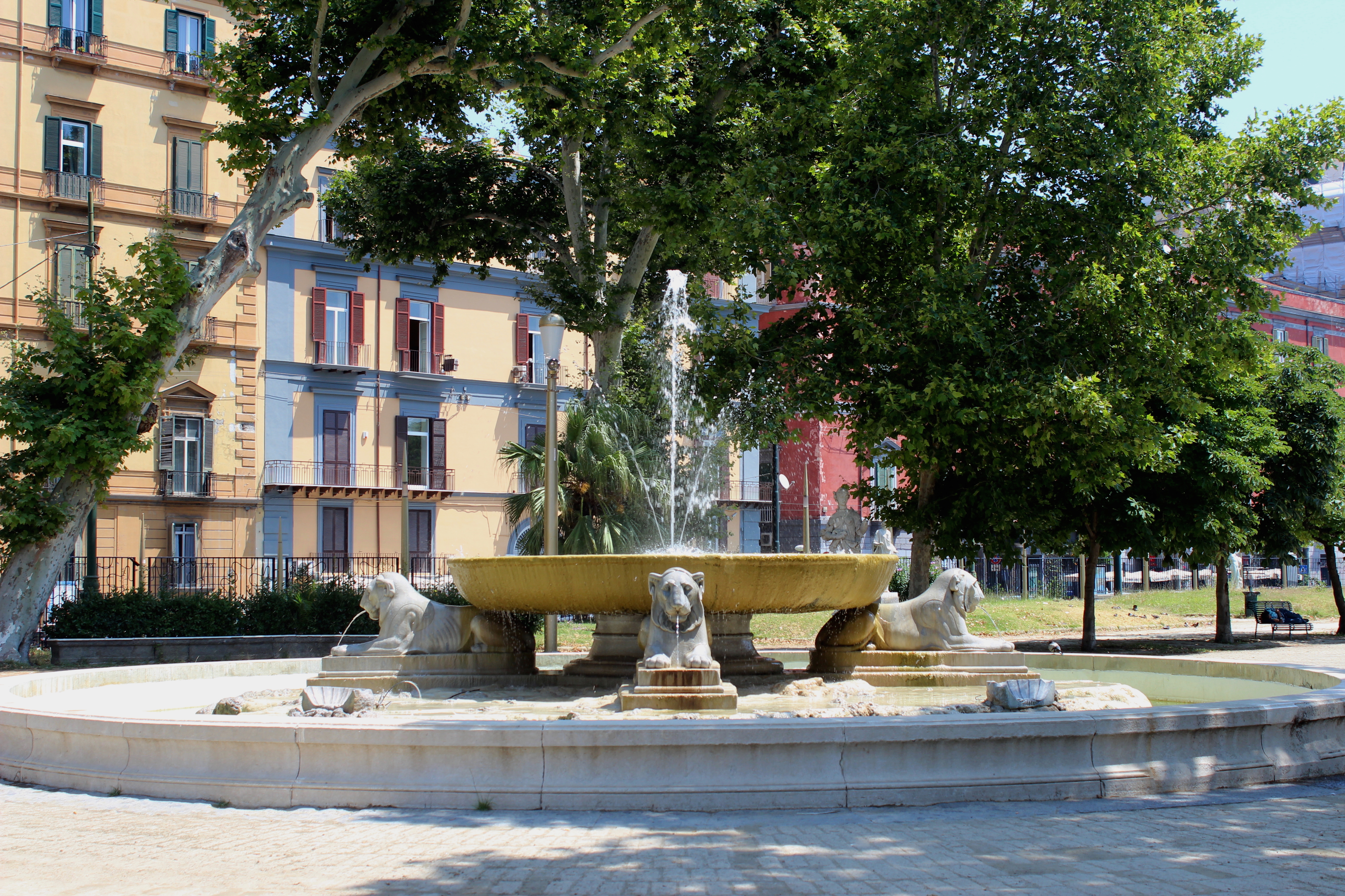 Nápoles. Villa Comunale. Fontana della Tazza di Porfido.